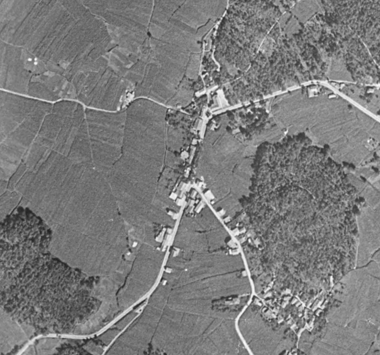 Imagen aérea de Cruceiro de Roo tomada por un vuelo americano de 1955.